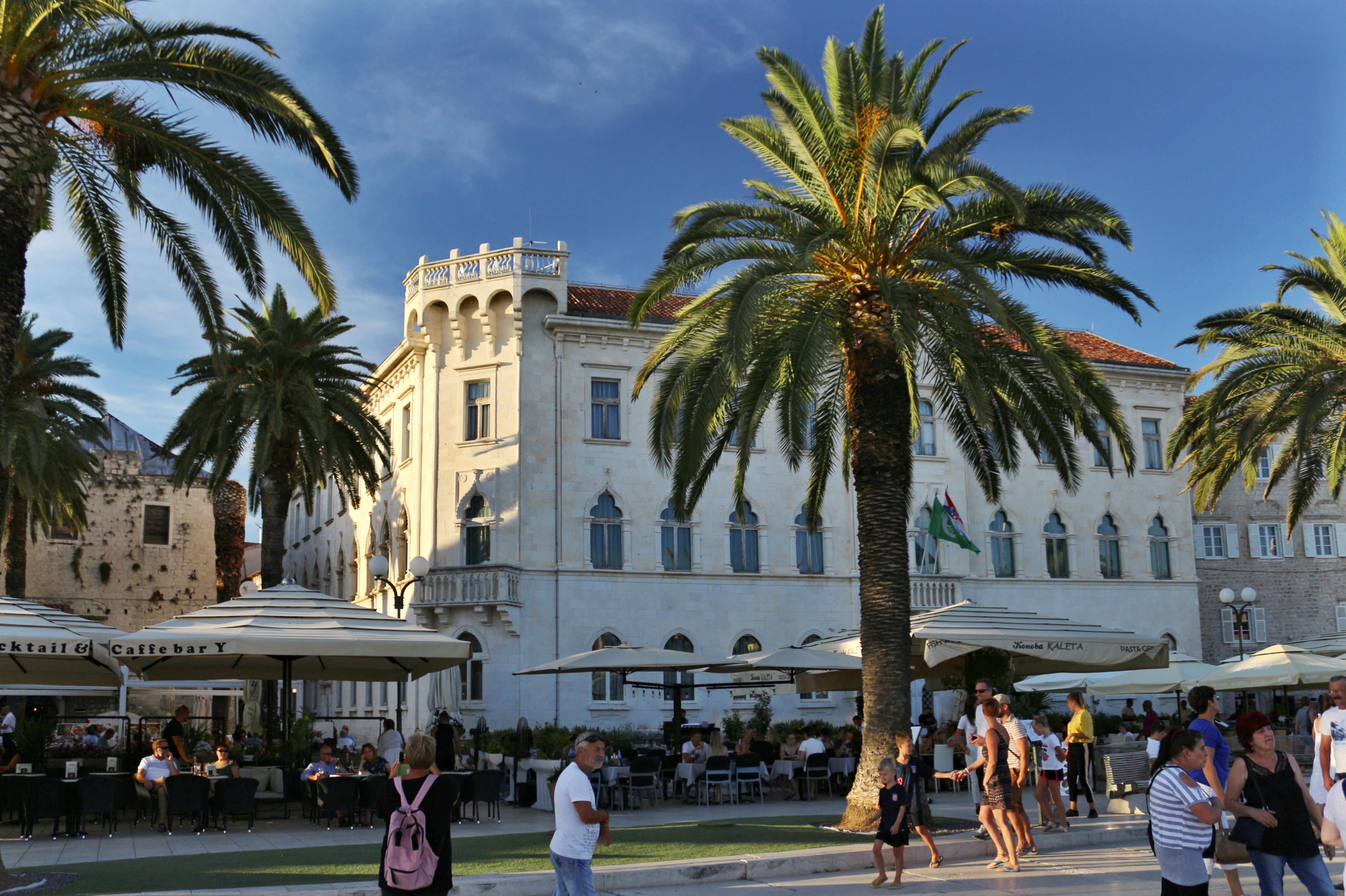 Trogir, Splitsko-dalmatská župa, Chorvatsko